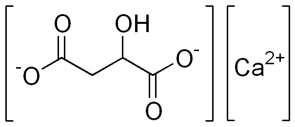 chemical structure of calcium malate